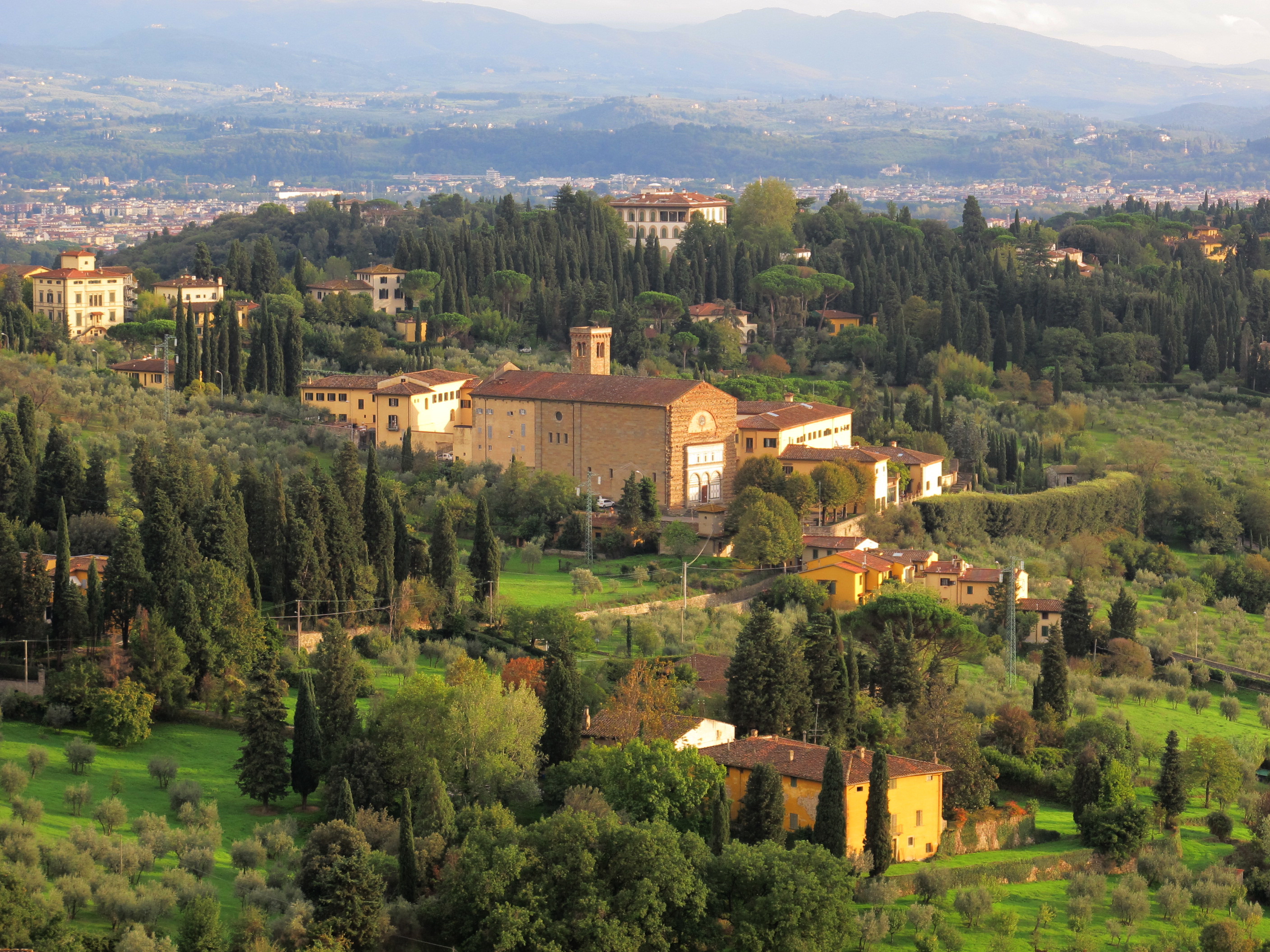 Monterinaldi, vista su fesole 03 badia fiesolana